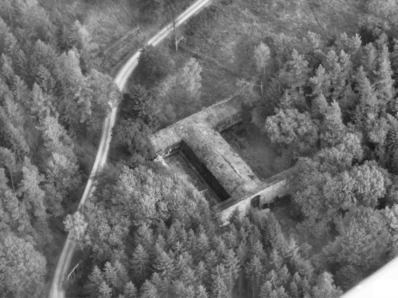 Das Foto zeigt eine im Jahre 1941 nicht fertig gebaute Brücke der geplanten Autobahn Kassel-Eisenach auf dem Gebiet der heutigen Gemeinde Söhrewald, östlich von Kassel. Diese Brücke wurde 1943 durch Junkers baulich angepasst und zu einem Verlagerungsbetrieb für den Motorenbau Werk Kassel umfunktioniert. Es entstanden eine Fertigungsfläche von ca. 200 m² in der Brückenröhre und jeweils ca. 250 m² durch entsprechende Überdachungen an beiden Seiten. Im 3.Quartal 1943 begann man dort mit der Teilefertigung und betrieb diese mit einer Belegschaft von ca. 50 Personen bis Kriegsende.